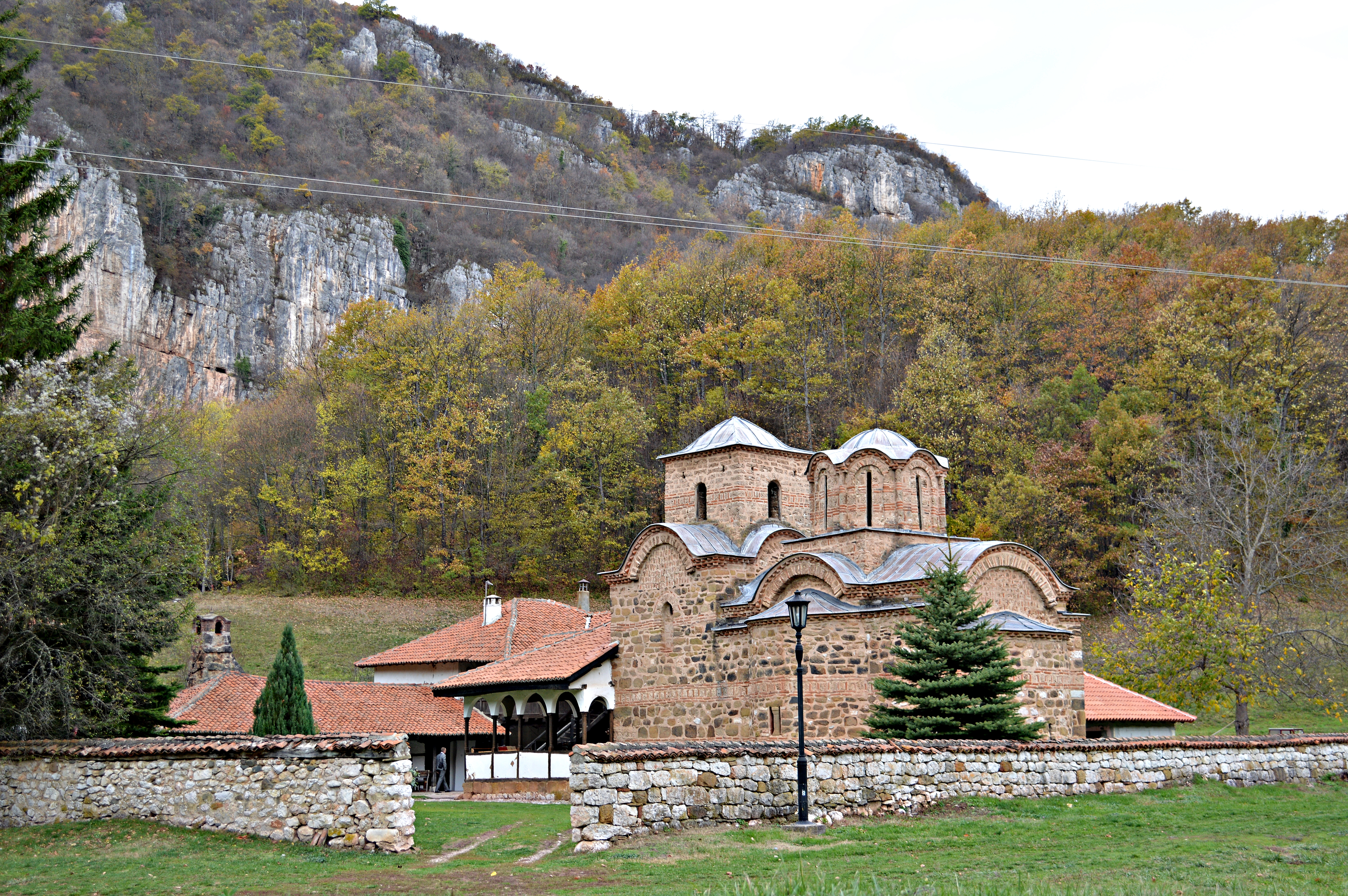 Манастирът "Св. Йоан Богослов е разположен на левия бряг на живописната река Ерма близо до гр. Димитровград в Югоизточна Сърбия